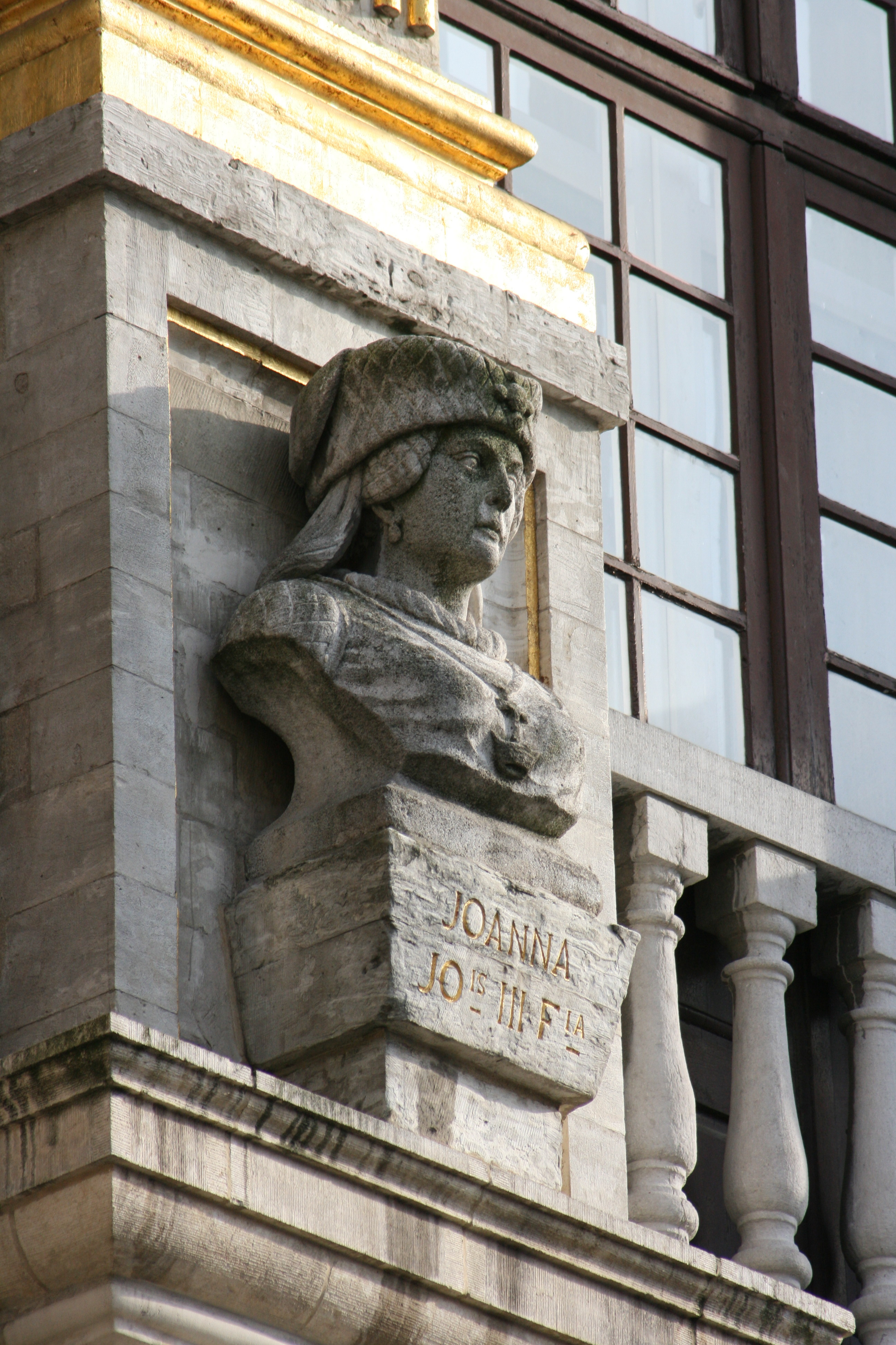 Grand-Place, Bruxelles, Belgique. Maison des Ducs de Brabant. Détail: buste de la duchesse Jeanne